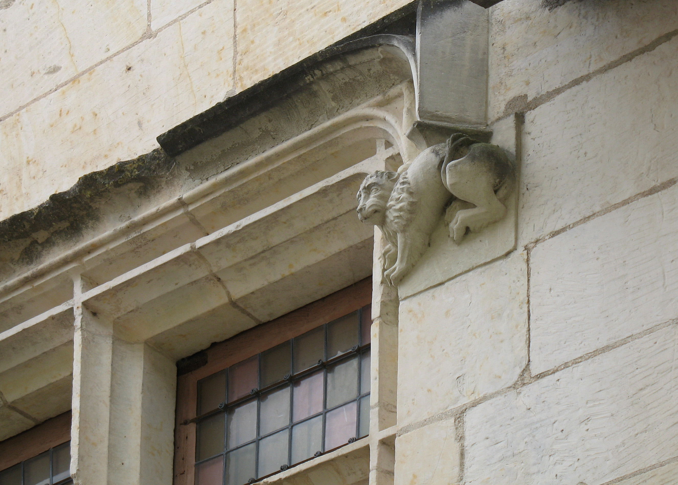 Fenêtre ouvragée à Crissay-sur-Manse, Indre-et-loire, France. Le village est classé parmi les plus beaux villages de France.